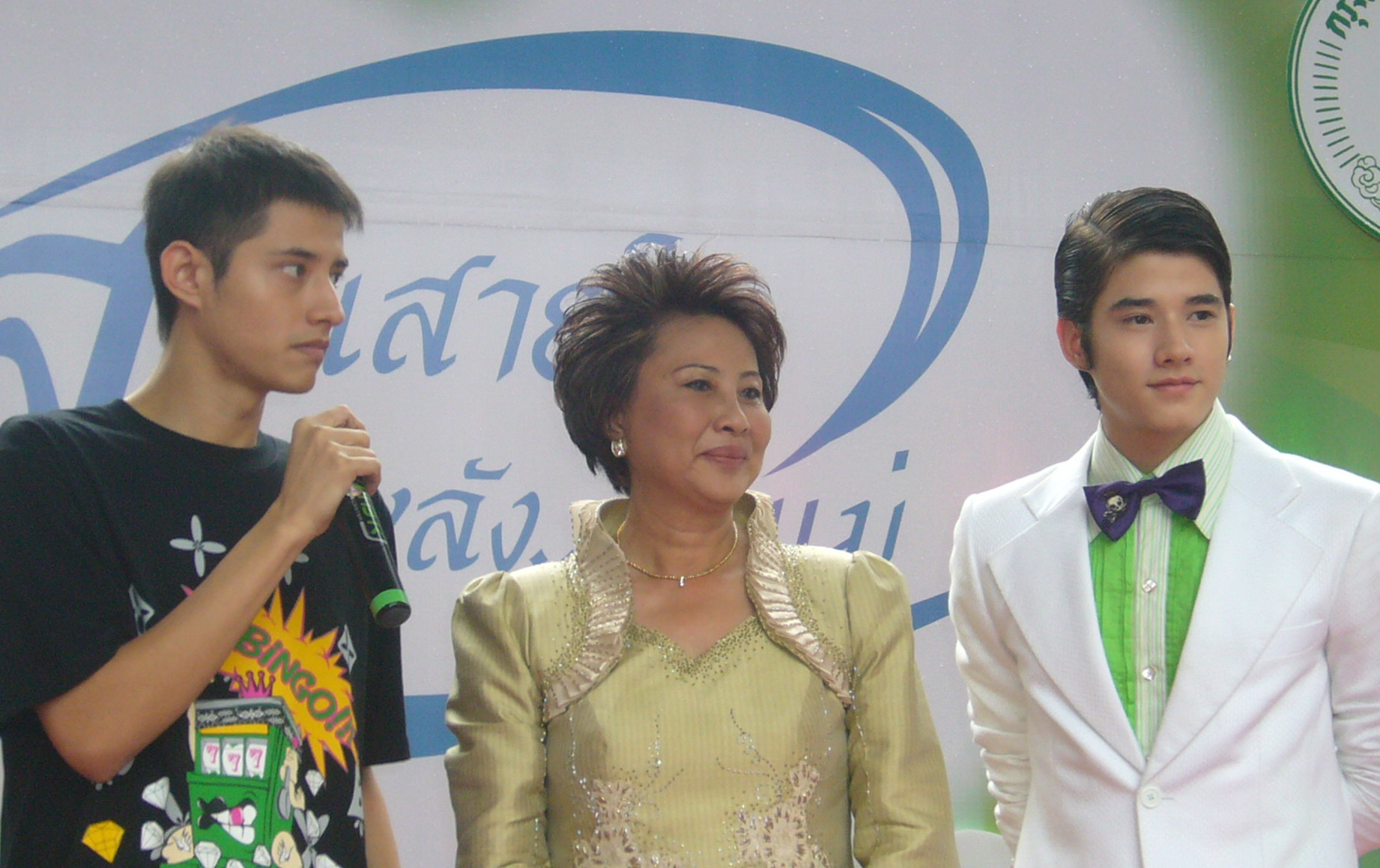 From L-R; Marco Maurer, Warunya Maurer, Mario Maurer